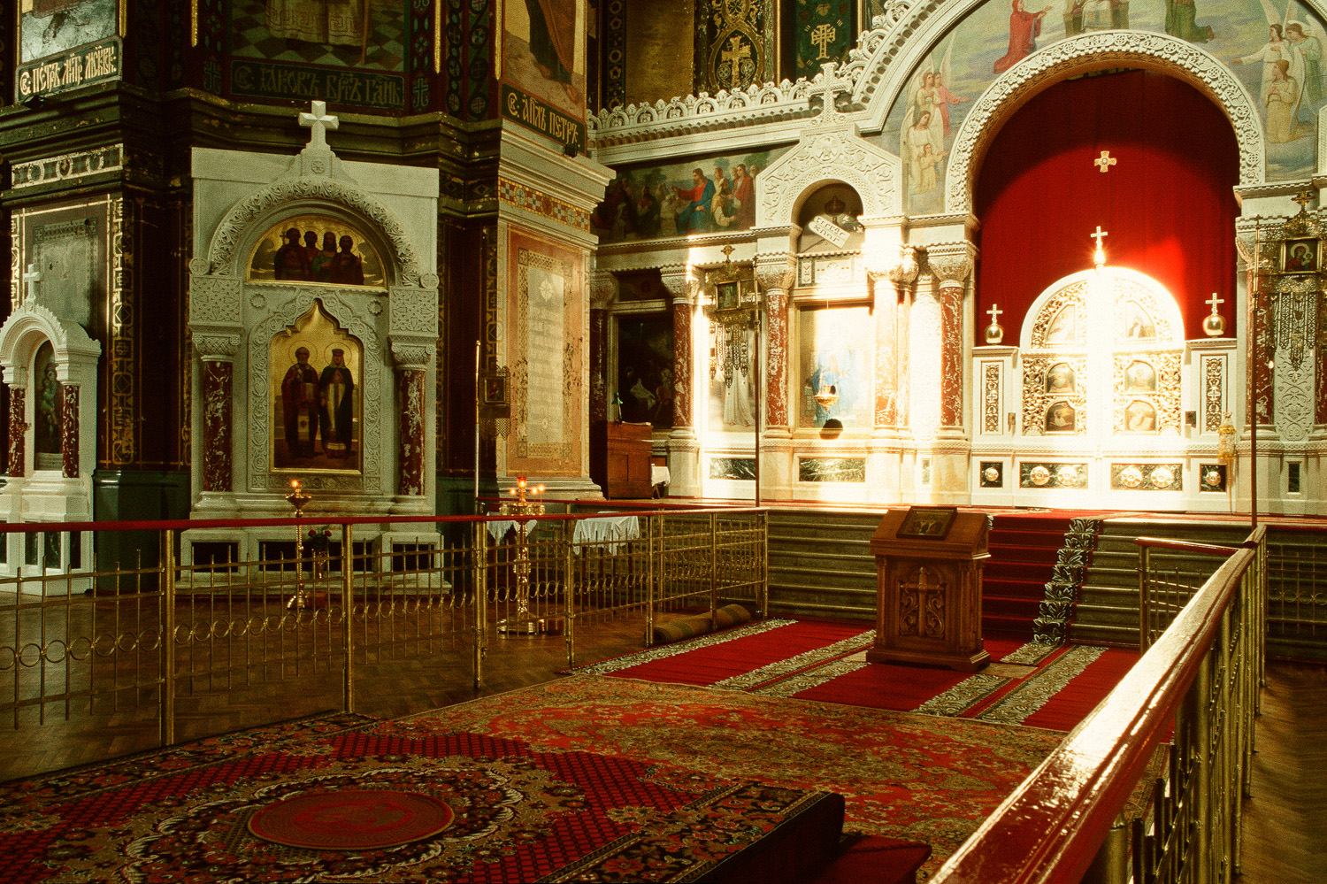 Алтарь Новочеркасского кафедрального собора в г. Новочеркасске Ростовской области